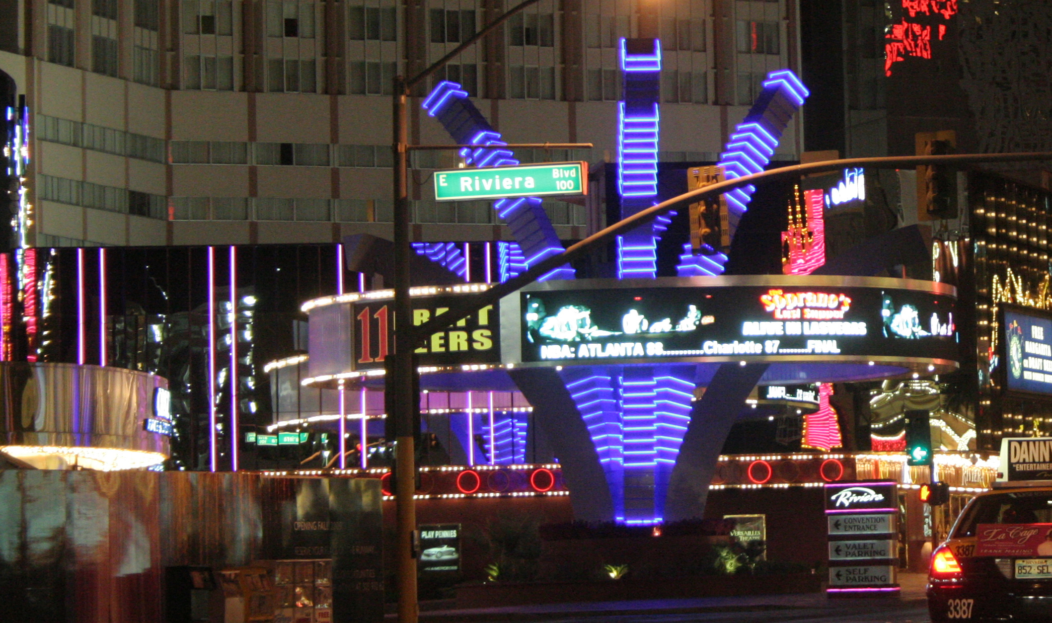 Kasino am Las Vegas Boulevard mit den typischen Leuchtröhren.